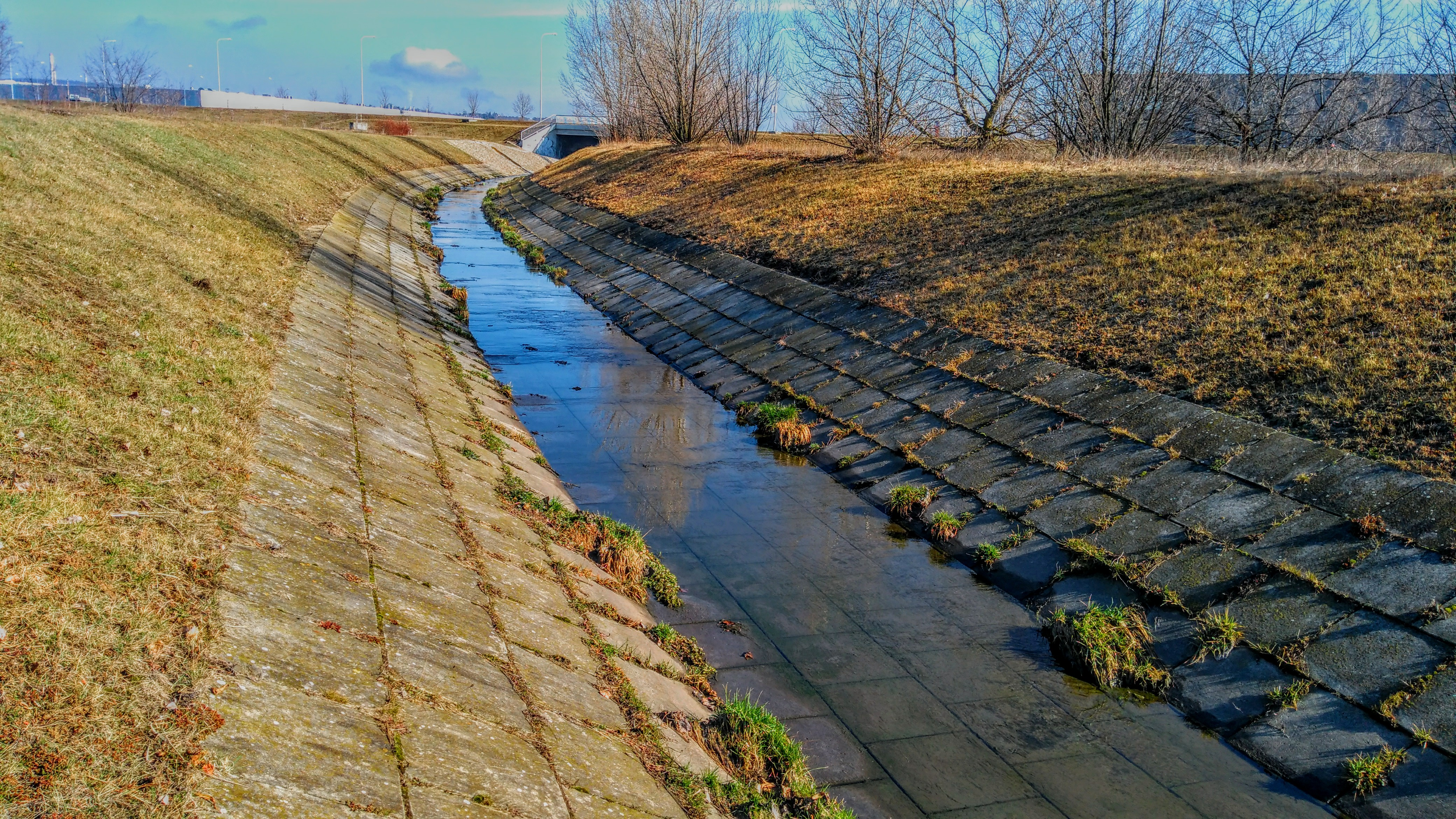 Ivanovický potok.